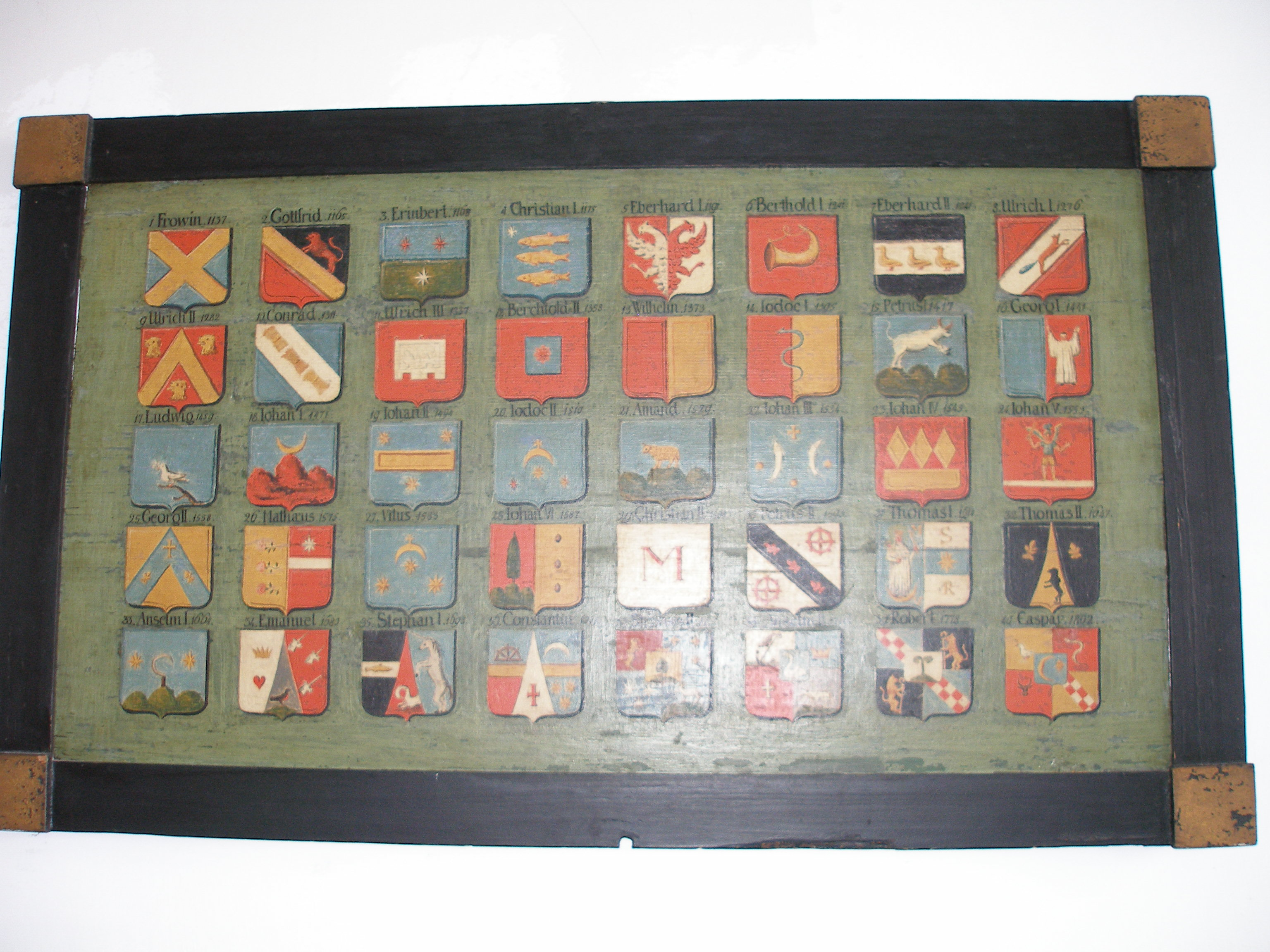 Kloster Salem; Wappentafel mit den Wappen aller Salemer Äbte